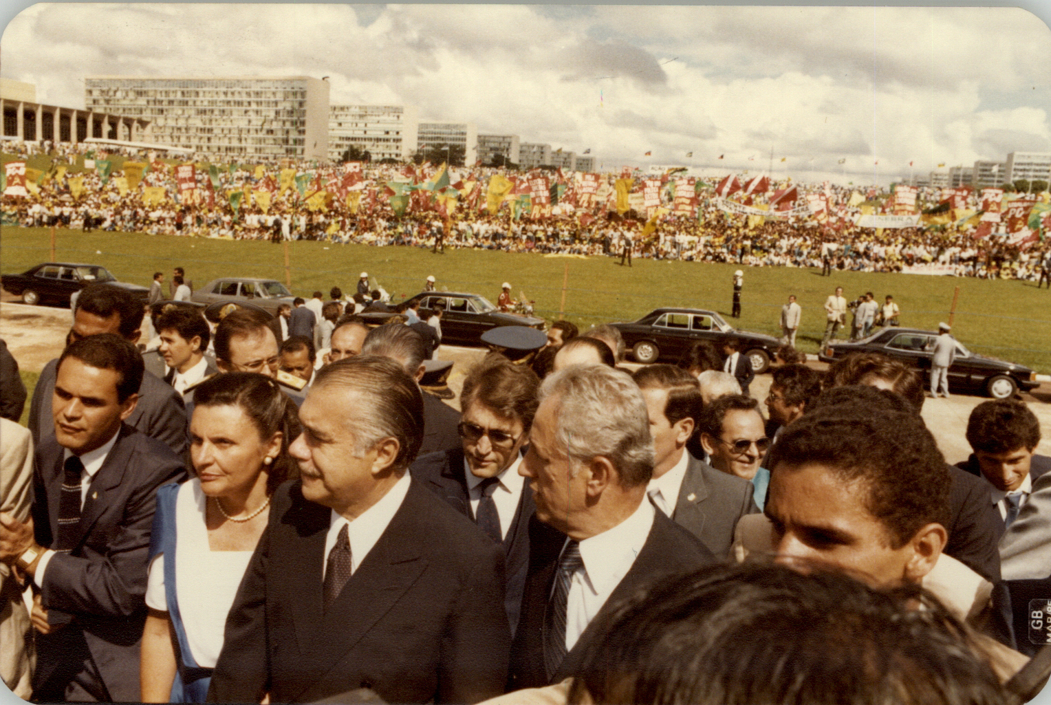 Subida da rampa do Congresso Nacional durante cerimônia de posse do presidente da República José Sarney, em 15 de março de 1985, em sessão conjunta do Congresso Nacional. Foto: Senado Federal